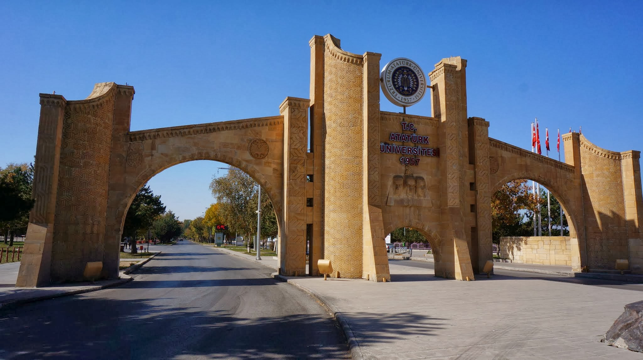 Erzurum, Turkey